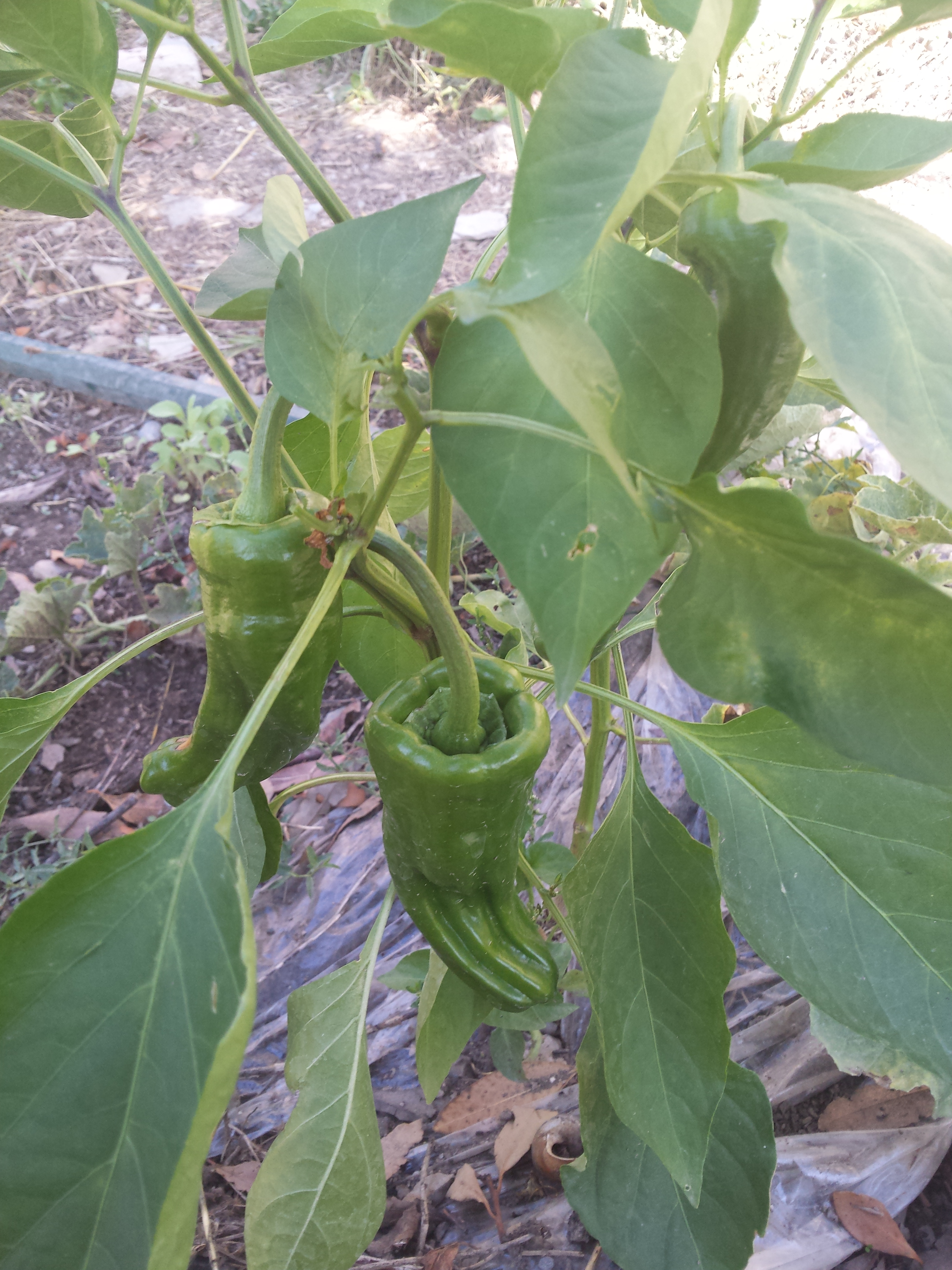 Pebrots del tipu italià (friggitelli) cultivats a Castelltallat